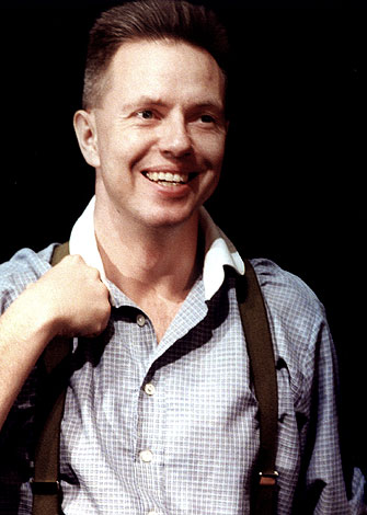 Zbigniew Suszyński - Georg Ginns w sztuce "Nasze Miasto" Thorntona Wildera w reżyserii Macieja Englerta